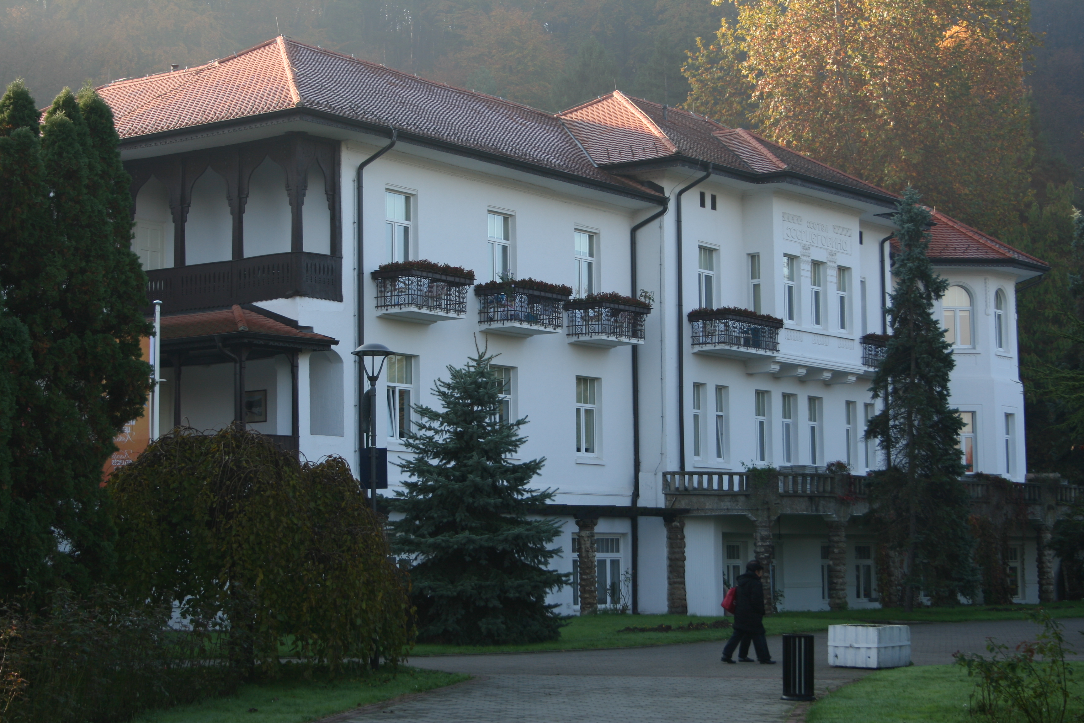 Specijalna bolnica za rehabilitaciju Banja Koviljača